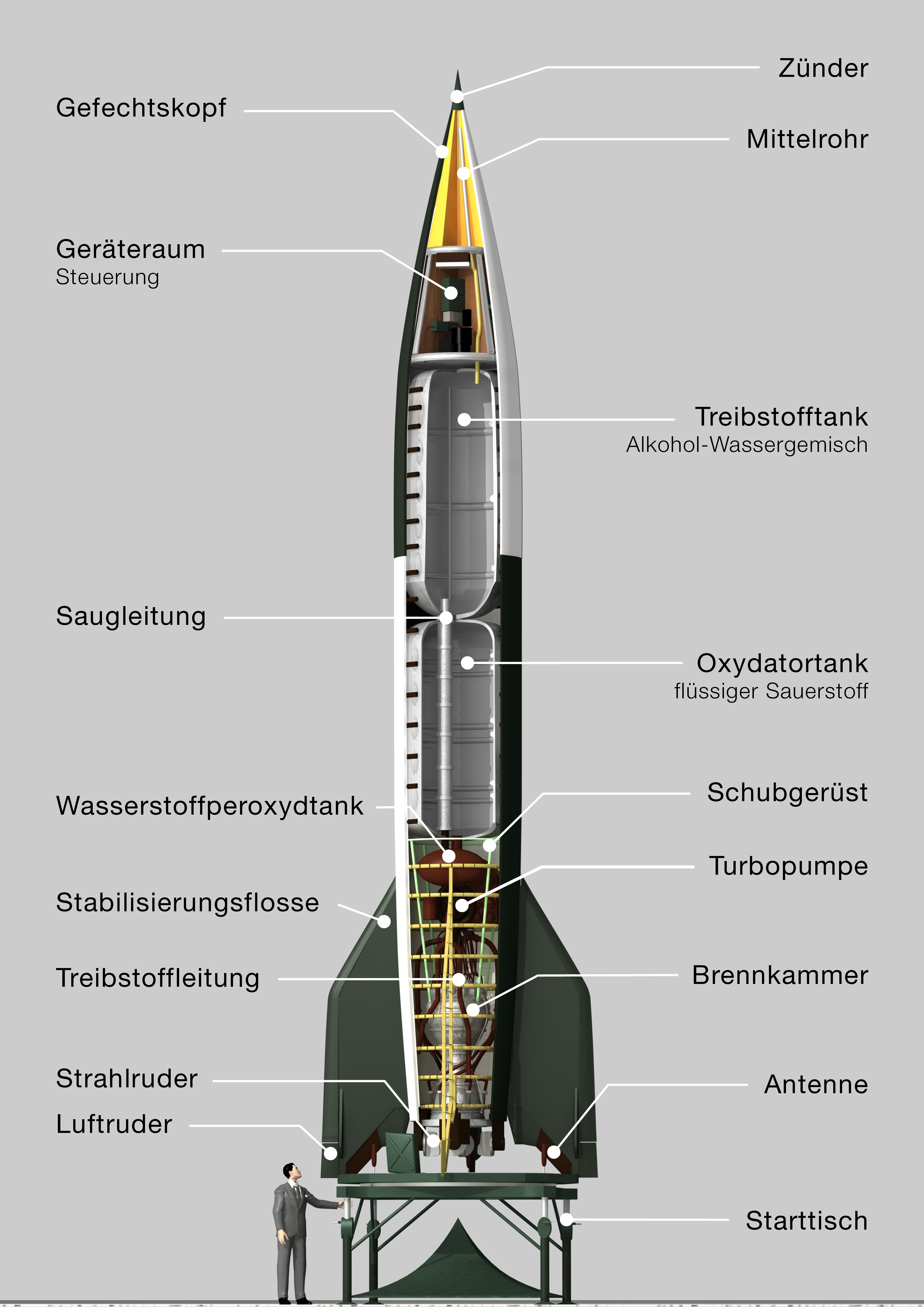 Schnittdarstellung der Rakete Aggregat 4/V2